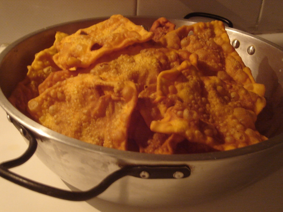 Mmmmmmm hojaldra untada de manjarblanco